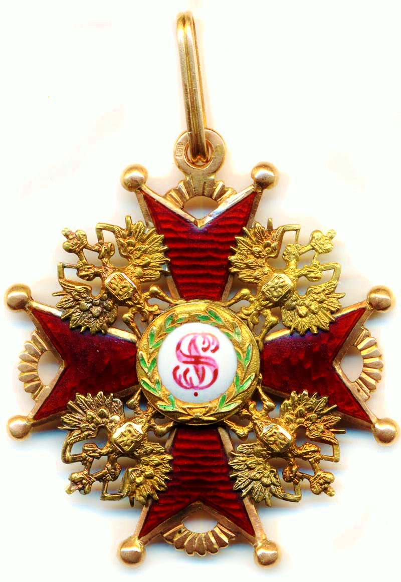 Croce di terzo grado del reale ordine imperiale di San Stanislao. L'esemplare raffigurato è stato prodotto nel laboratorio di Julius Kejbel', fornitore ufficiale degli ordini onorifici nel periodo 1862-1882